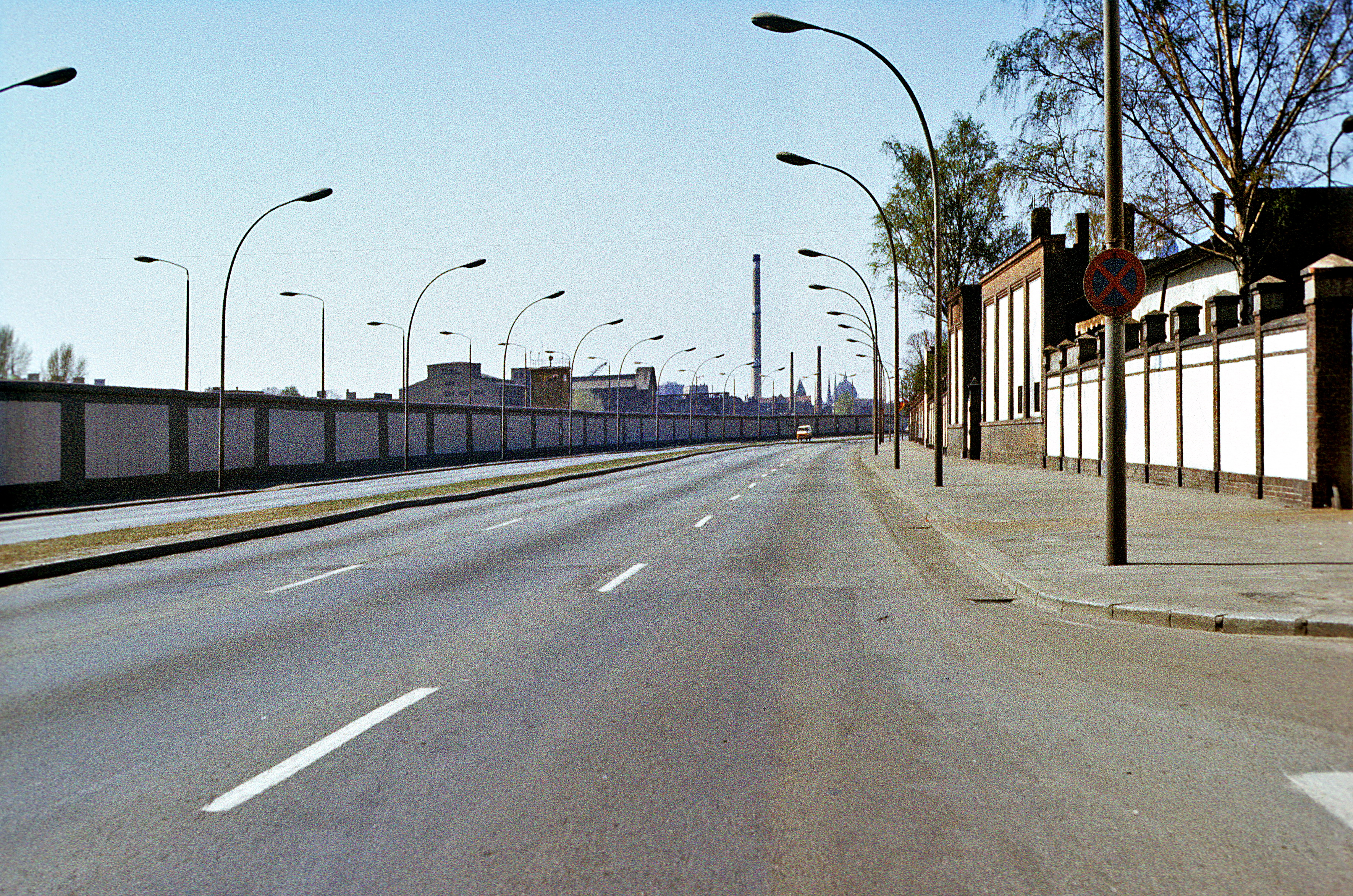 Mauer in Höhe Warschauer Straße, Berlin-Friedrichshain